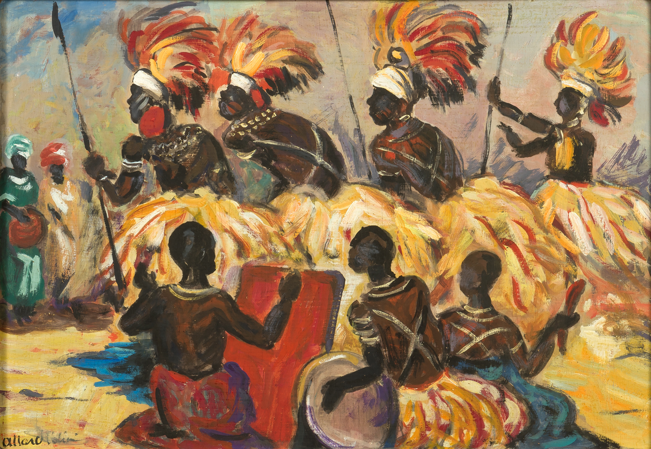 Scènes africaines